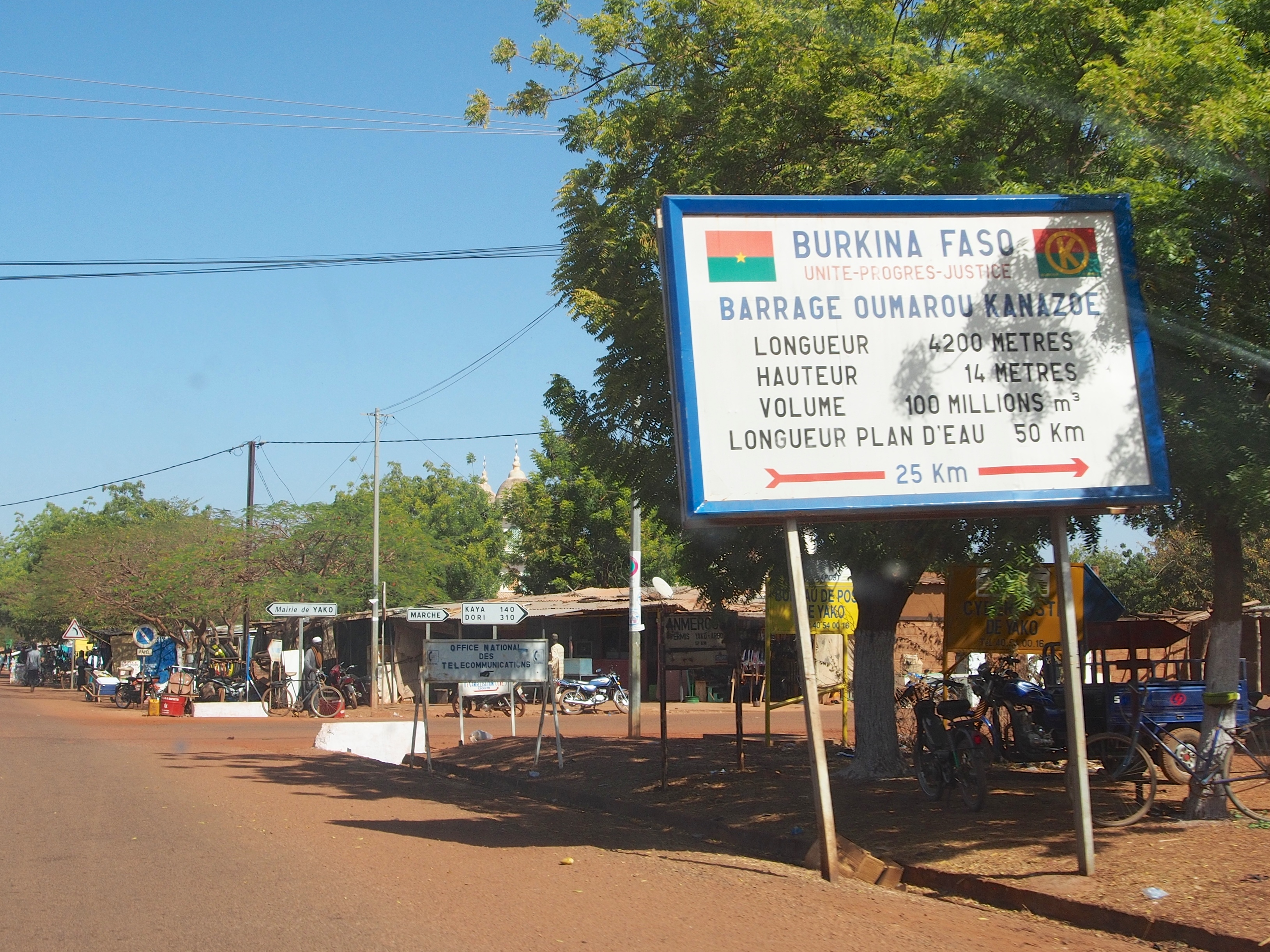 Pancarte indiquant le barrage Oumarou Kanazoé, Yako, province du Passoré, Burkina Faso